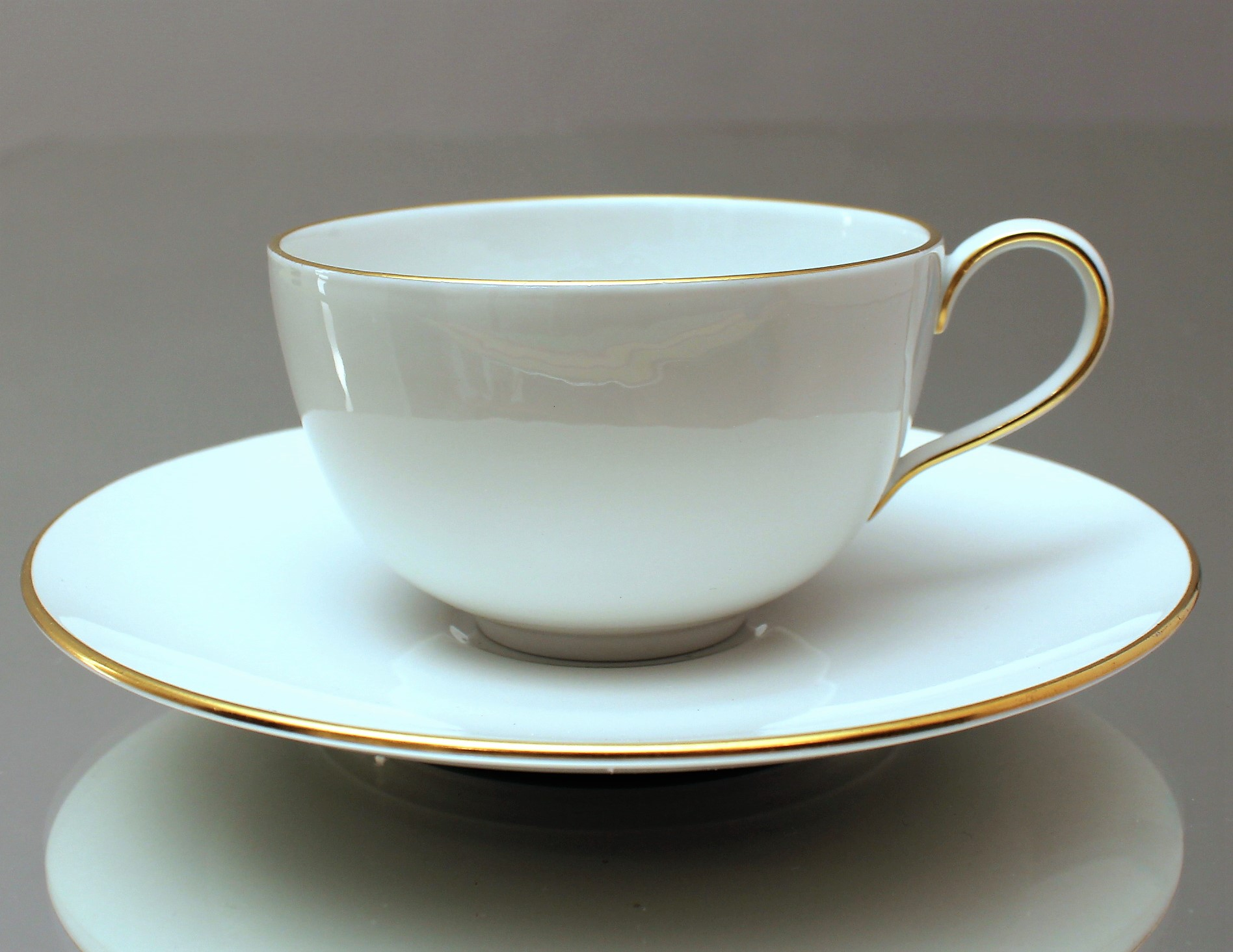 Kaffeetasse halbhoch Golddekor 05 (Obertasse mit Untertasse) aus der Service-Serie Urbino (Entwurf: Trude Petri, 1931) der Königlichen Porzellan-Manufaktur Berlin (KPM). Das Service im Bauhaus-Stil der Neuen Sachlichkeit wird von KPM bis heute produziert.